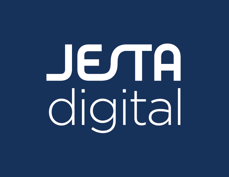 Jesta Digital Logo